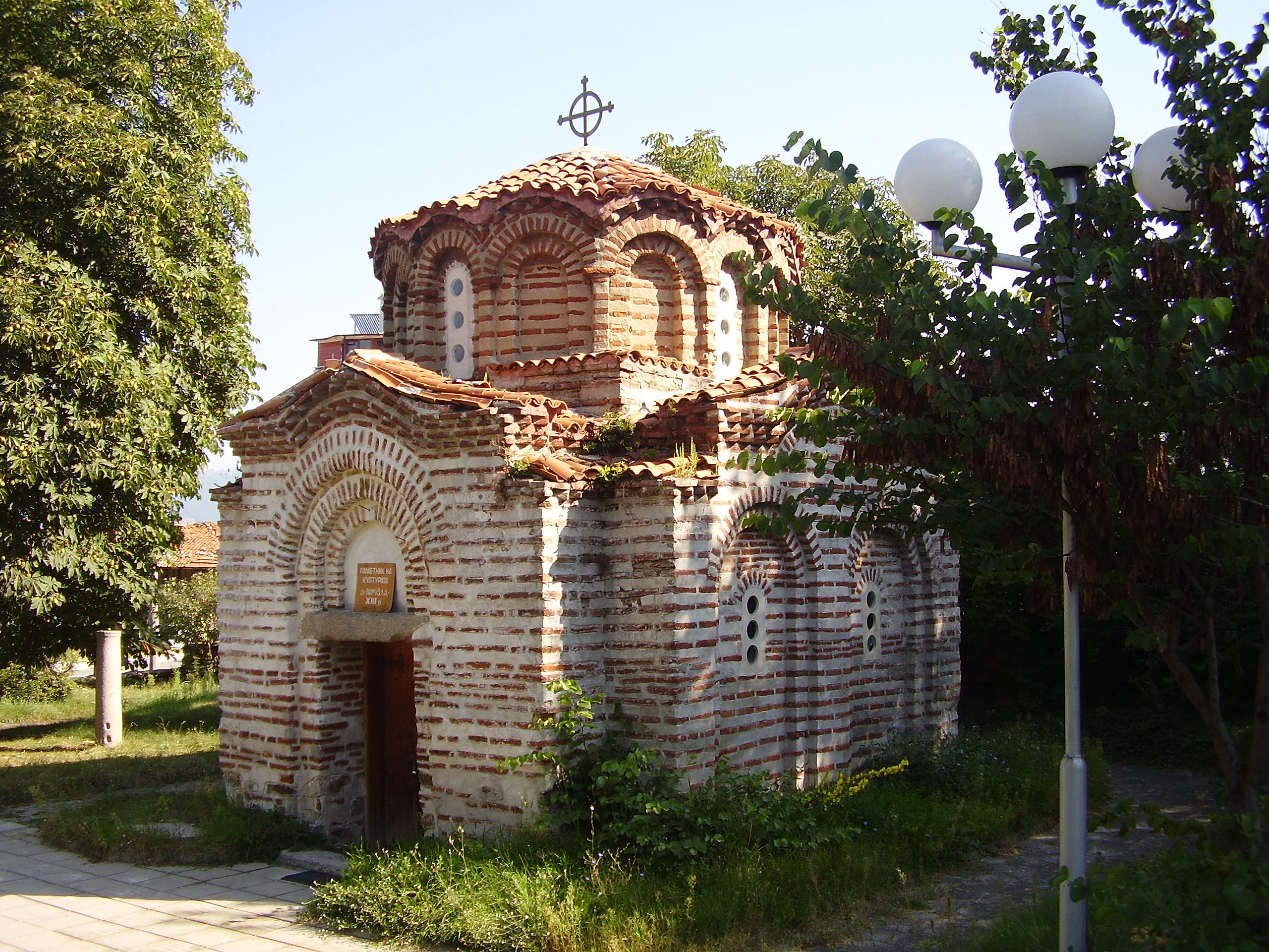 Средновековна църква "Свети Никола" - гр.Сапарева баня